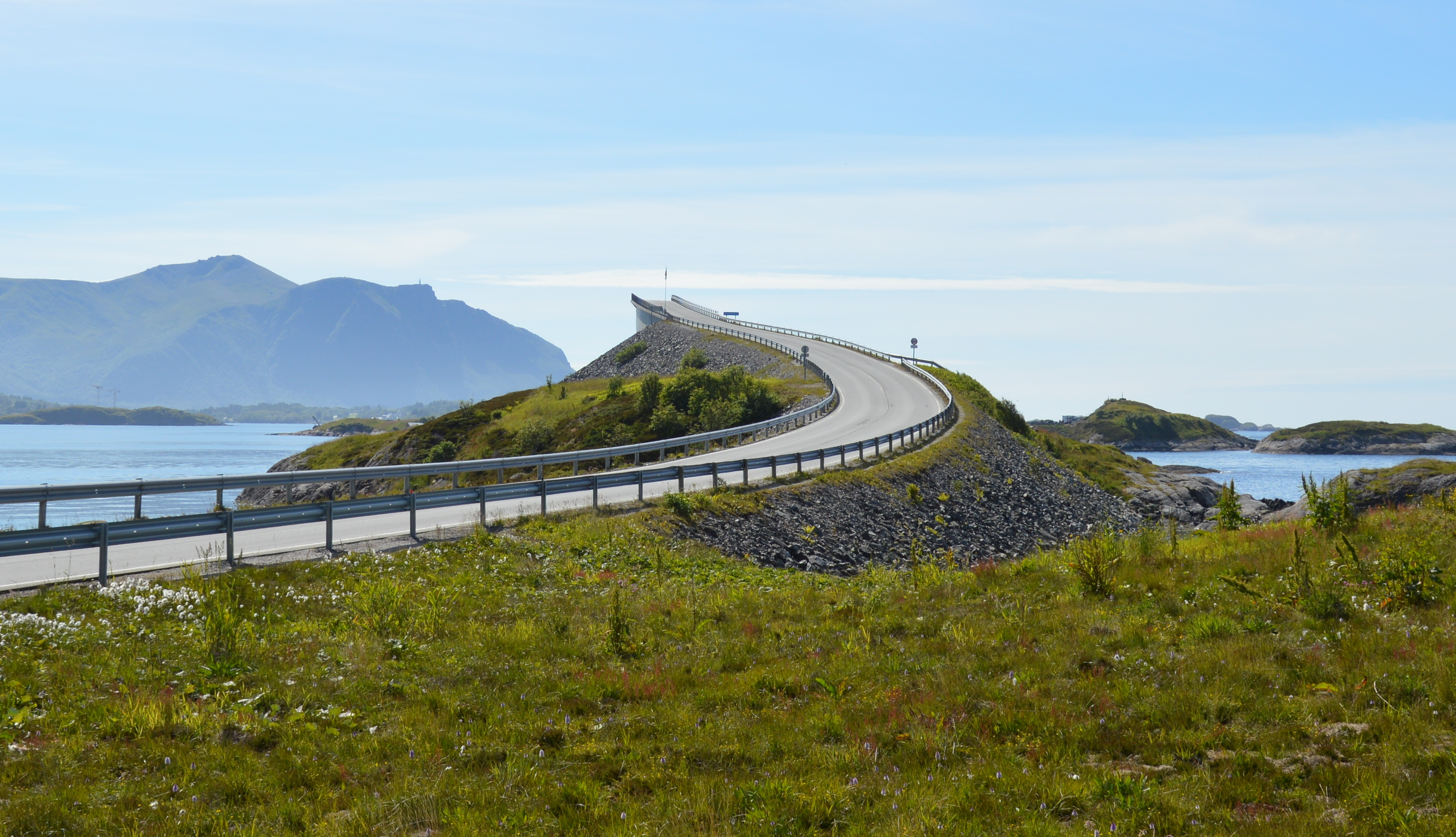 Storseisundbrua